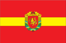 Прапор Любарського району